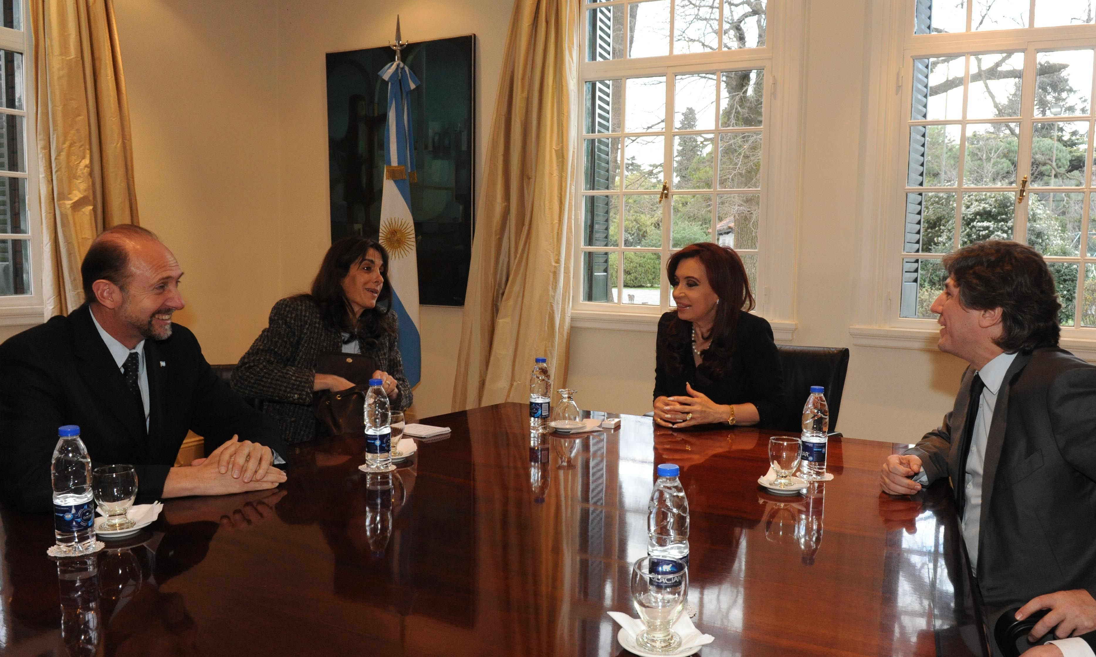 La presidenta Cristina Fernández recibió en la residencia de Olivos a María Eugenia Bielsa, candidata electa a diputada provincial en Santa Fe. Las acompañaron el intendente de Rafaela, Omar Perotti, y el ministro de Economía, Amado Boudou.